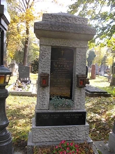 Wilhelm Wacek-Wiener Zentralfriedhof (69B-10)